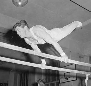 Benjamin de Roo